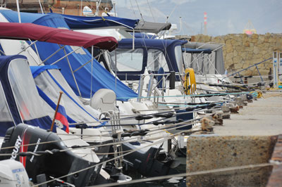 Яхт-клуб Русское Море